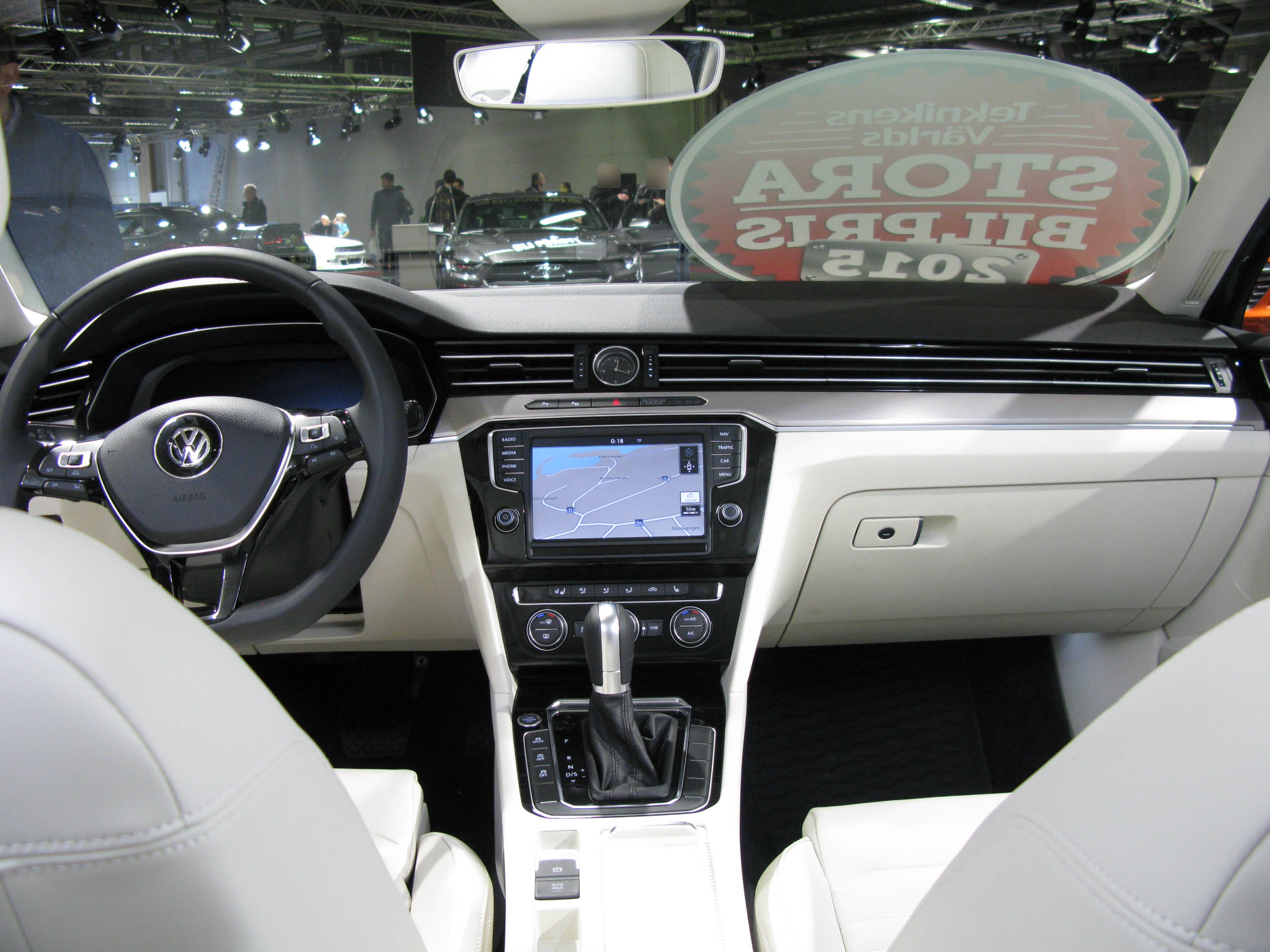 Volkswagen Passat B8